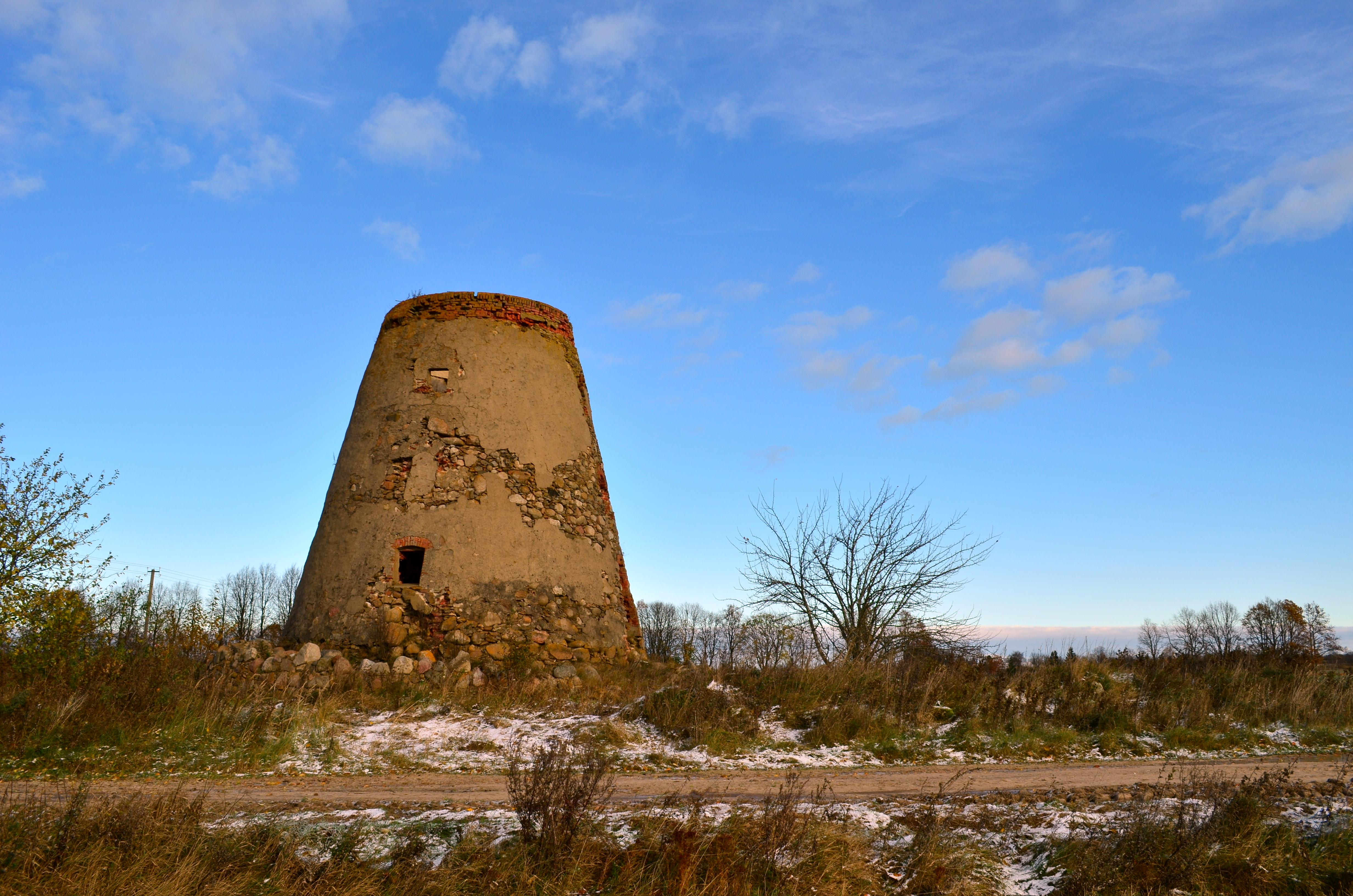 Anskrūžu vējdzirnavas / winmill